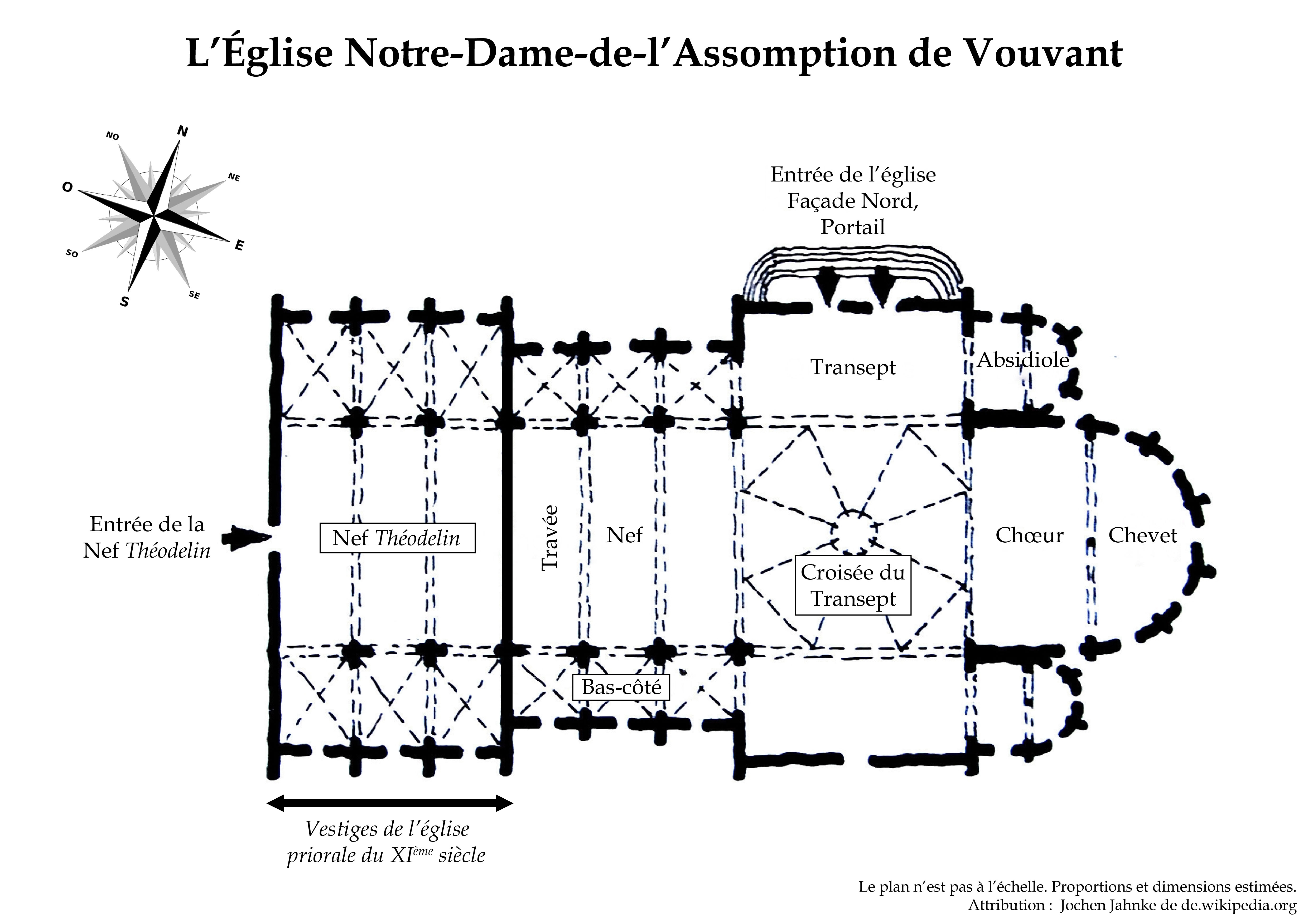 Plan de l'église de Vouvant. Modification et traduction du fichier original en allemand, importé par Jochen Jahnke.